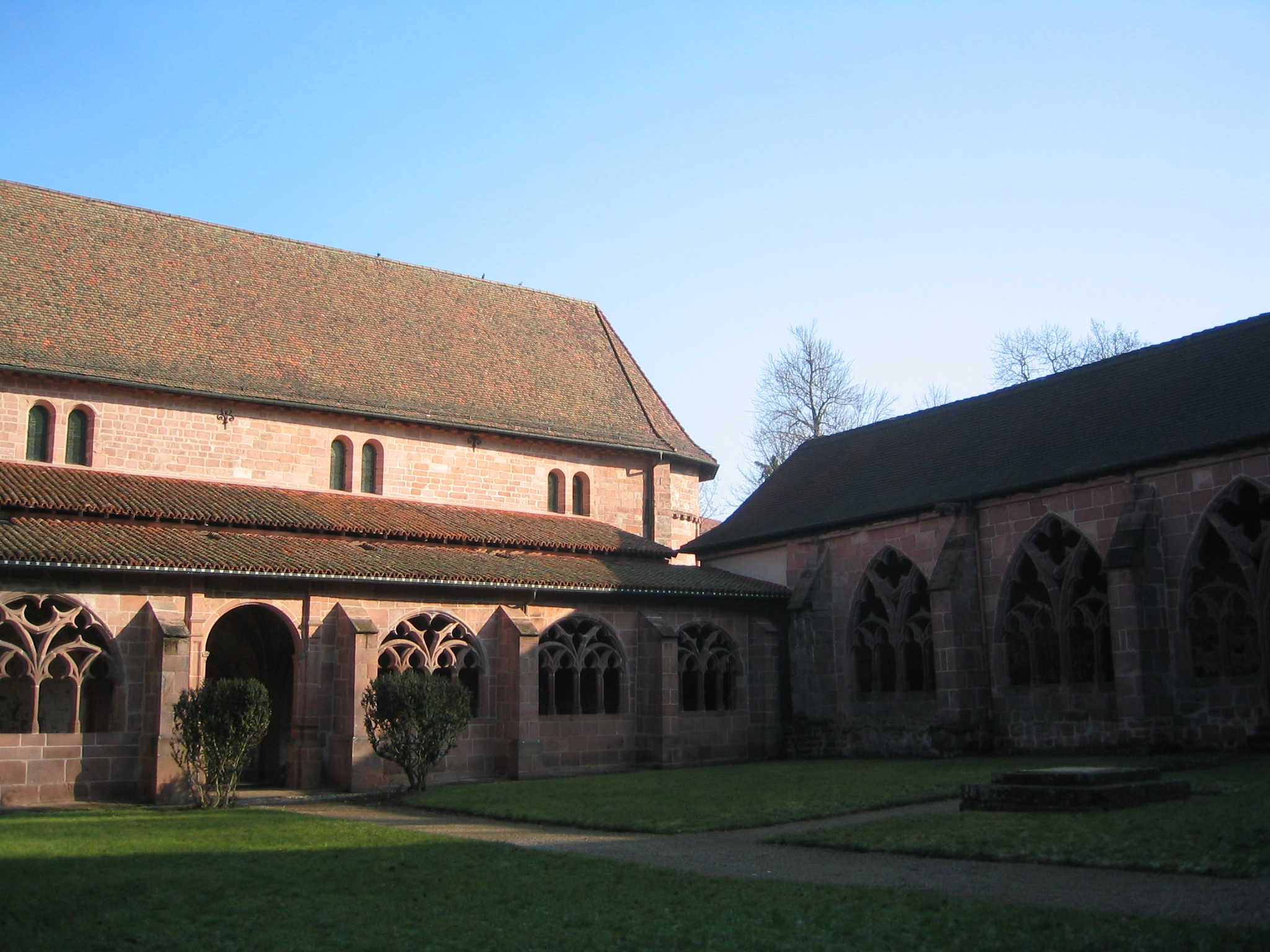 Cloître gothique de la cathédrale de Saint-Dié-des-Vosges